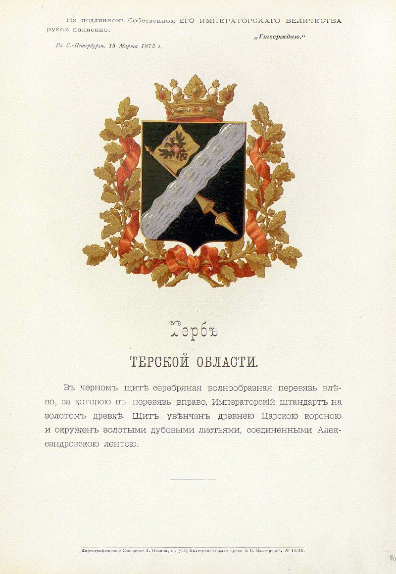 Official Russian Empire coat of arms Terek Oblast. Герб Российской Империи Терской области с официальным описанием в Гербовнике Бенке. Утверждён Императором Всероссийским Александром Вторым в 1873 году.